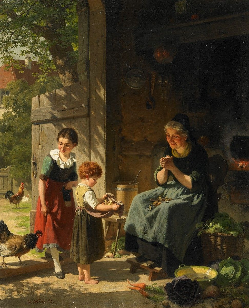 Die Hühnerküken. Signiert und datiert unten linsk: H. Werner 83. Öl auf Leinwand. 68 x 54,5 cm.